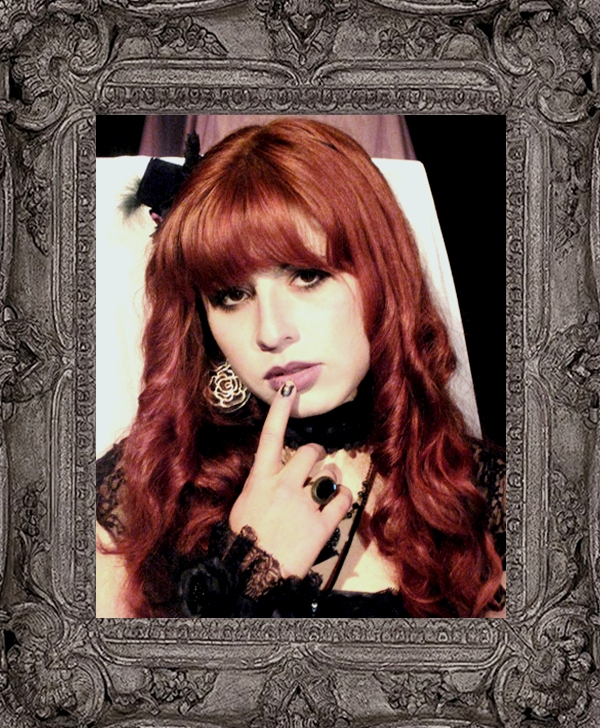 Maryan MG artista solista "Gothic lolita"